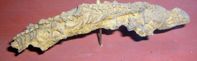 Protocaptorhinus pricei Clark & Carroll, 1973